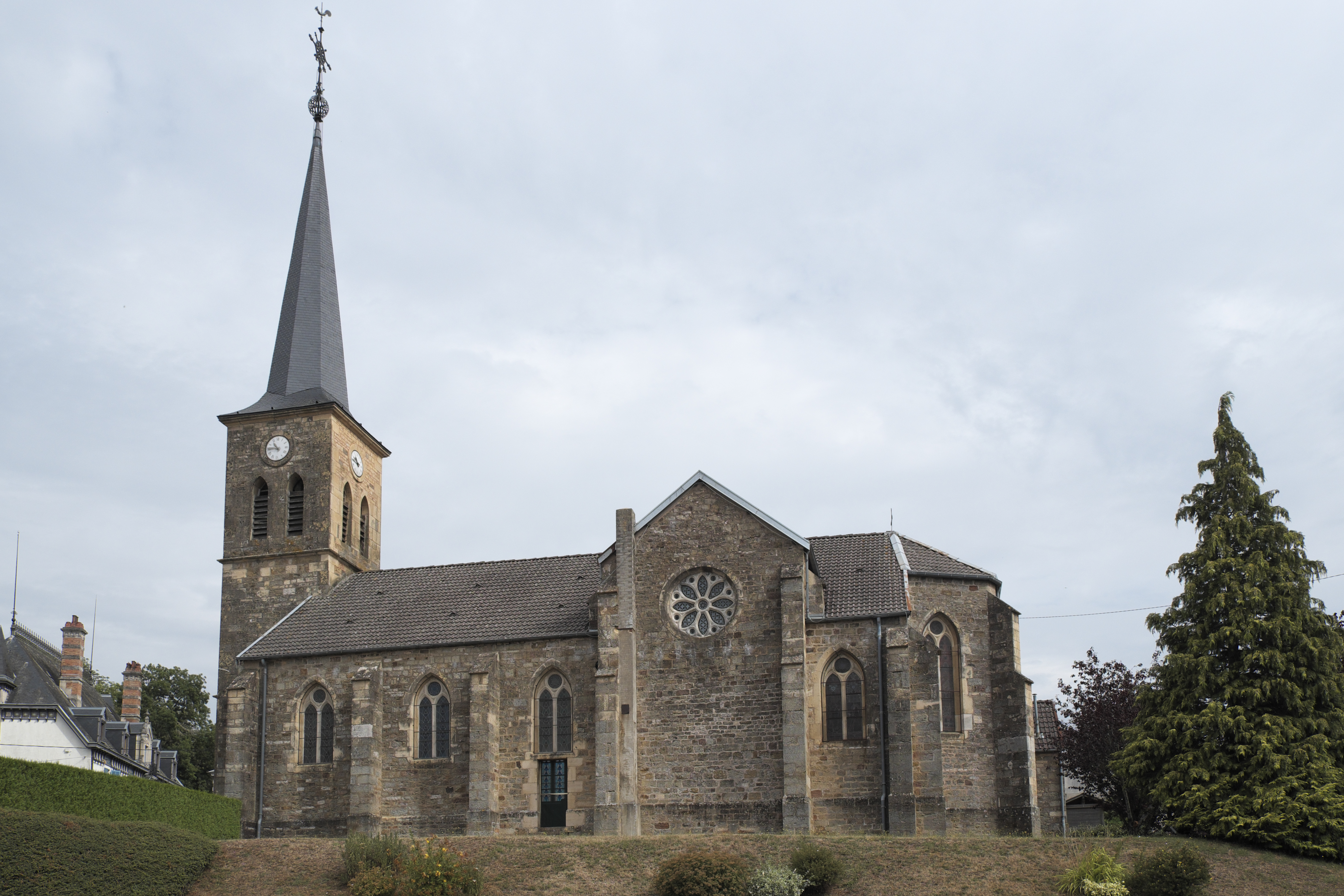 Katholische Pfarrkirche Saint-Maurice in Savigny (Haute-Marne) im Département Haute-Marne (Champagne-Ardenne/Frankreich)